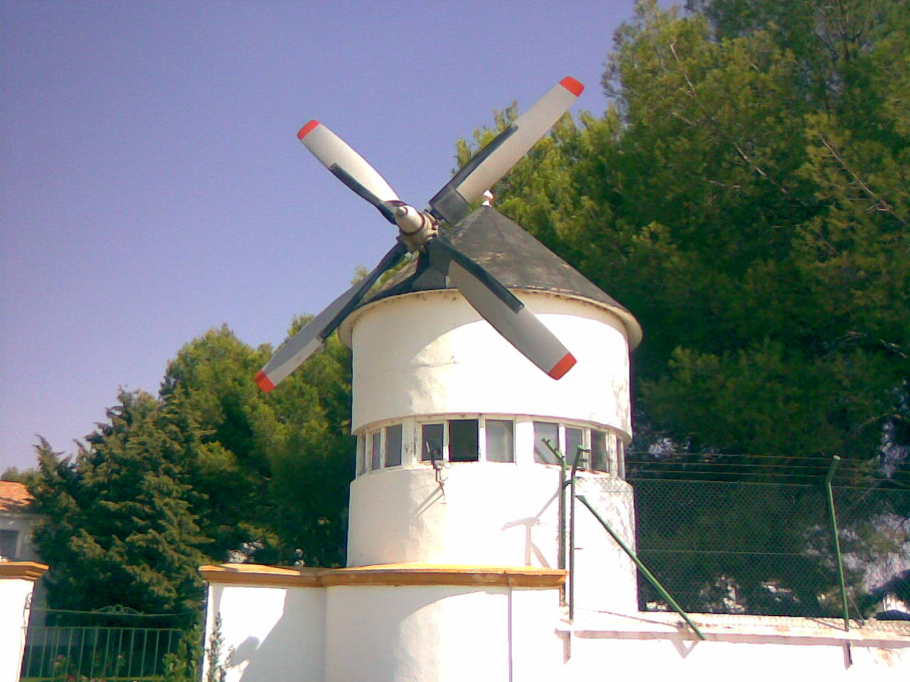 Molino de la entrada de la Maestranza Aérea de Albacete hecho con una hélice de un Boeing KC-97L